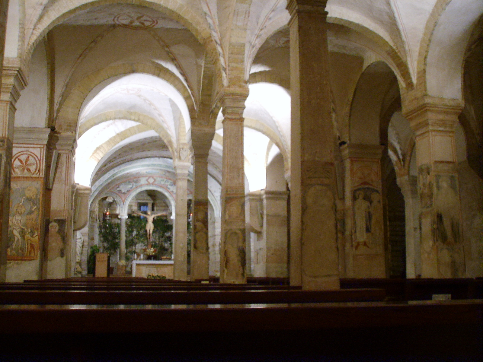 San fermo, verona, chiesa inferiore